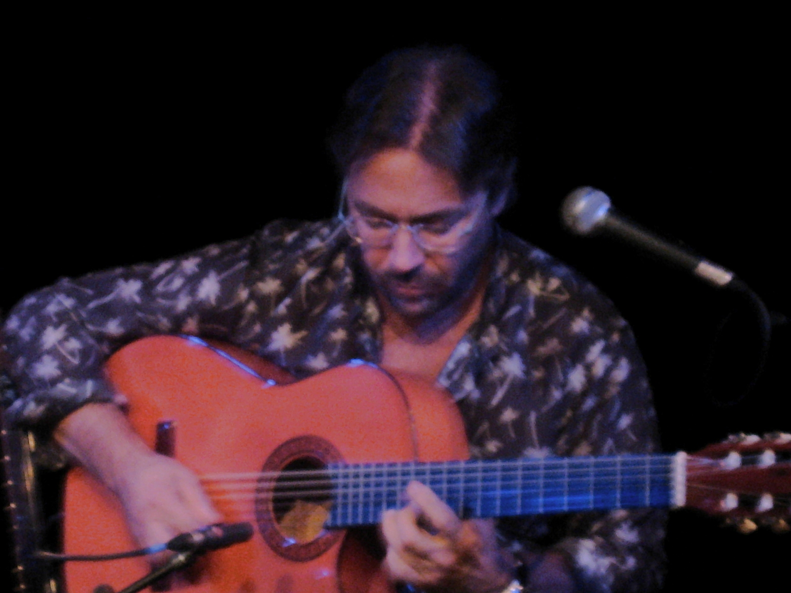 Al di Meola (mit Band), beim Konzert "New World Sinfonia" am 7. Mai 2009 in der Music Hall, Worpswede, Deutschland